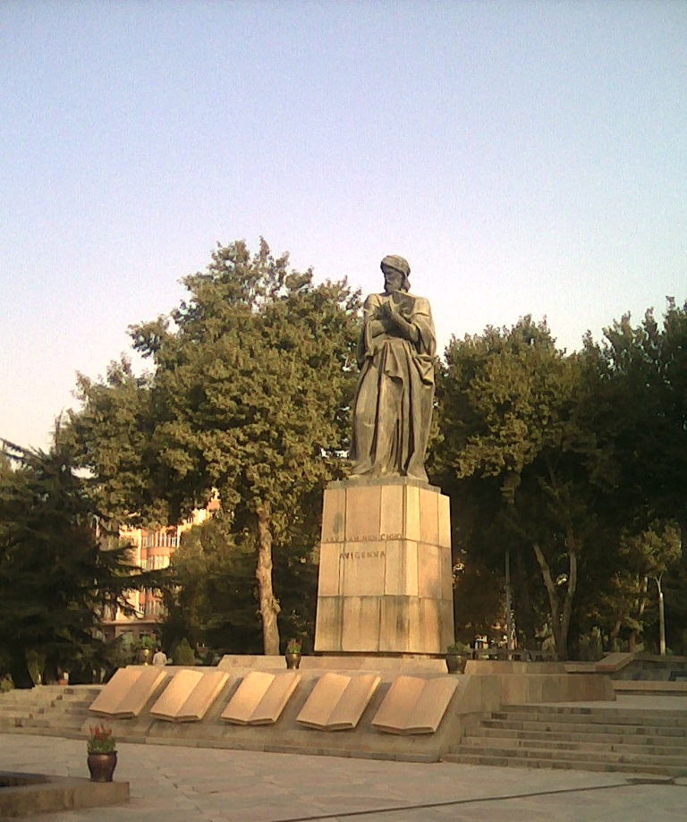 Тоҷикӣ: Муҷассамаи А. Сино дар ш. Душанбе